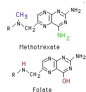 Catégorie:Image de chimie